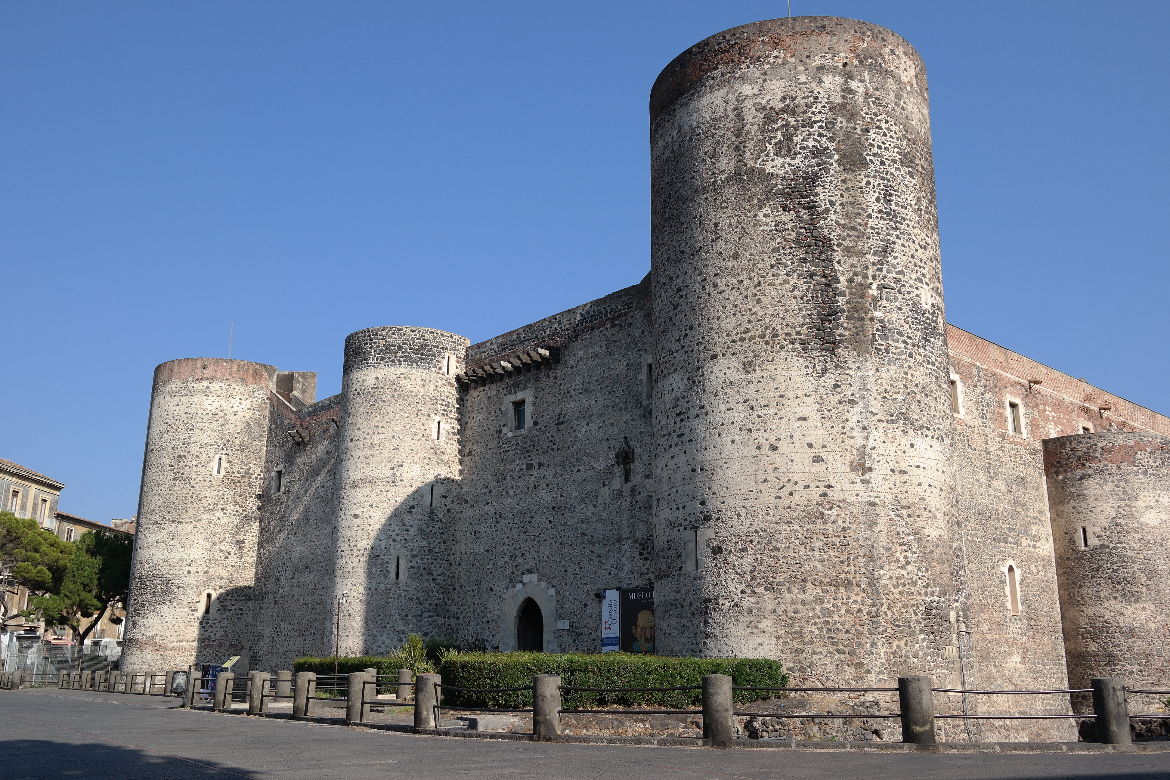 Castello Ursino a Catania